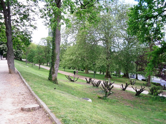 Le parc d'Avaucourt à Athis-Mons (91)